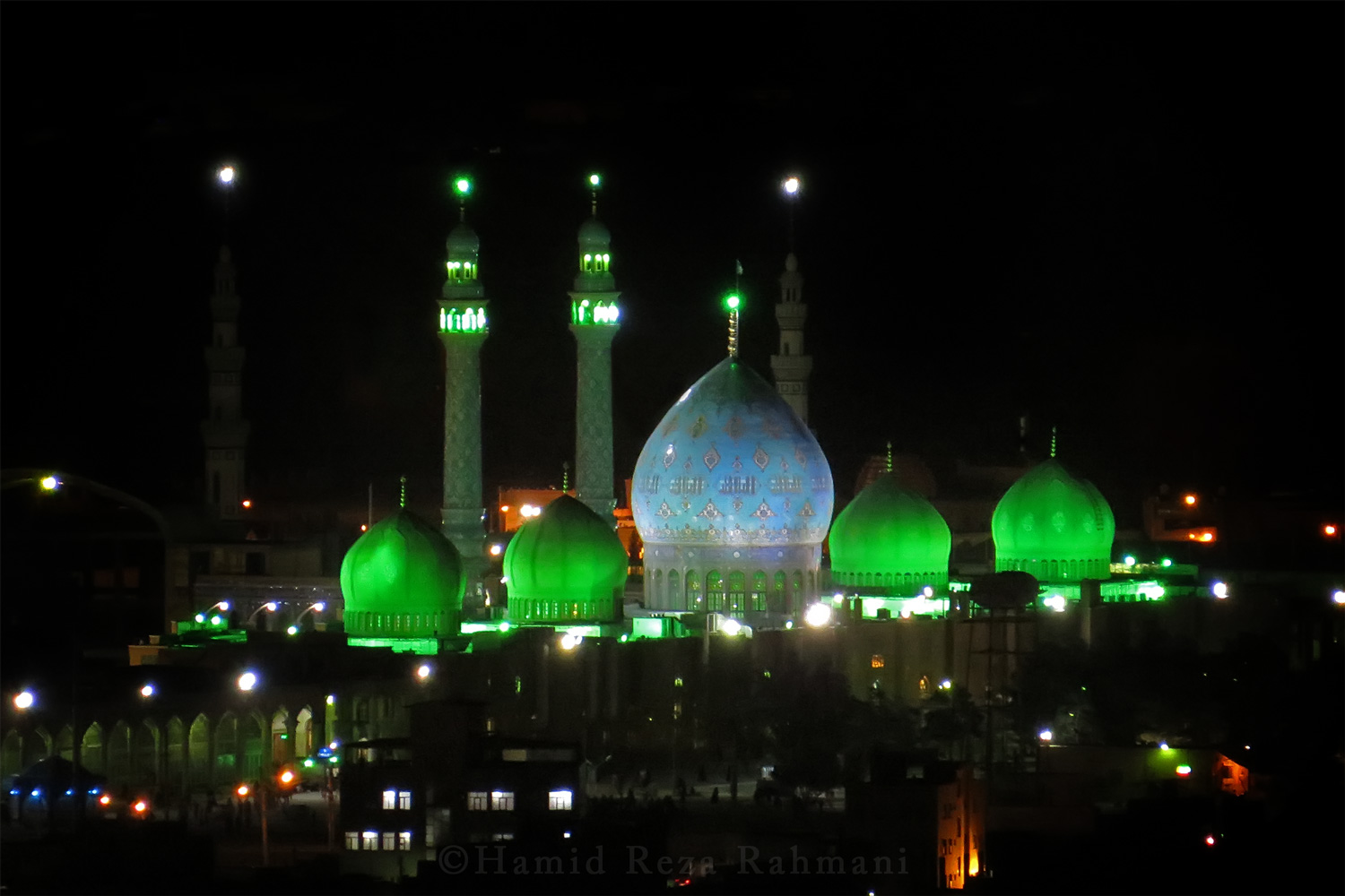 دور نمایی از مسجد جمکران